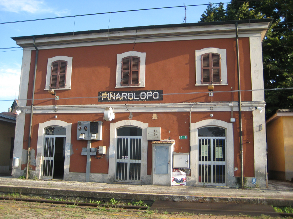 Stazione ferrovia di Pinarolo Po sulla linea Bressana Bottarone-Broni